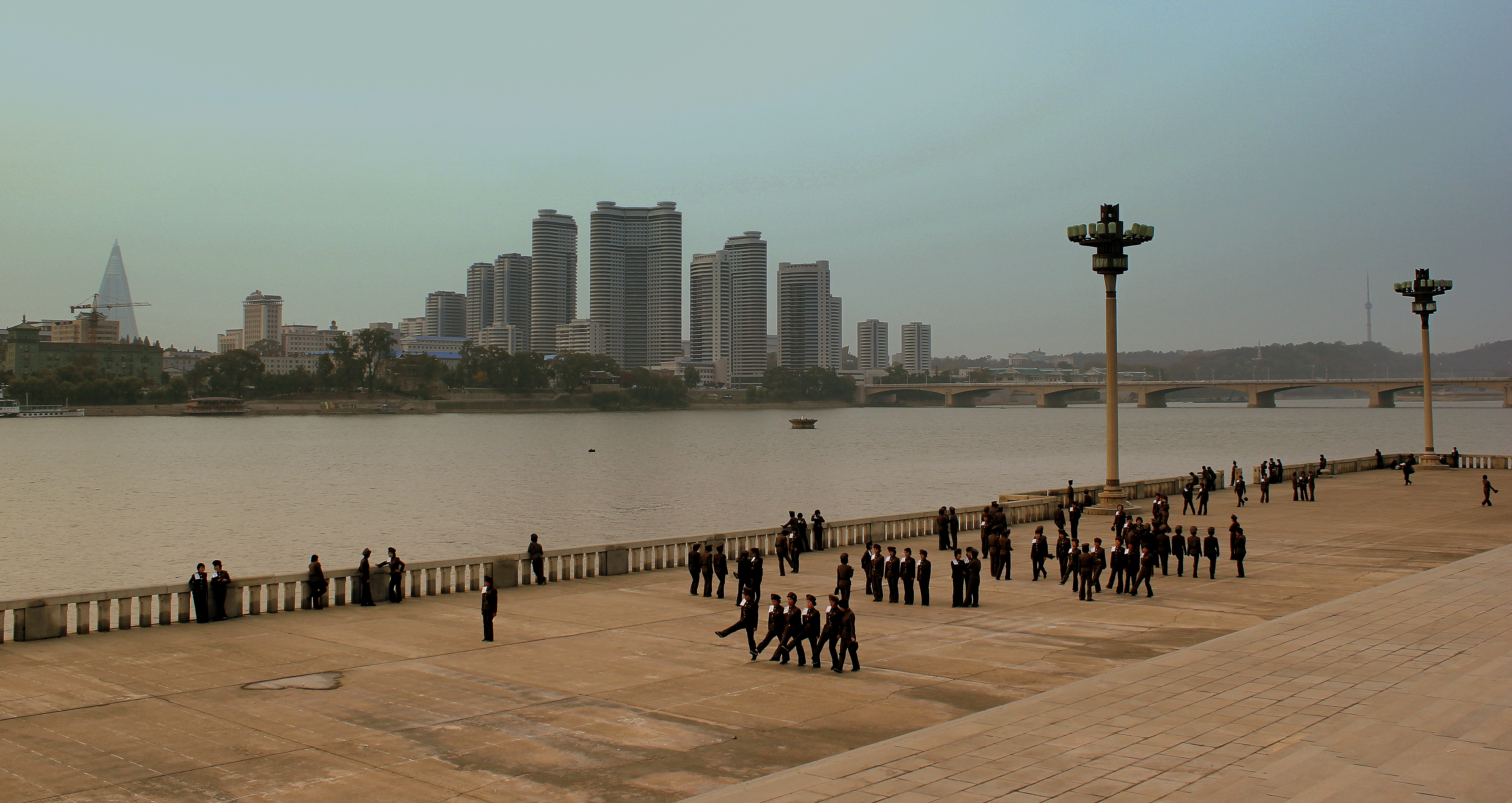 Taedong bank Pyongyang